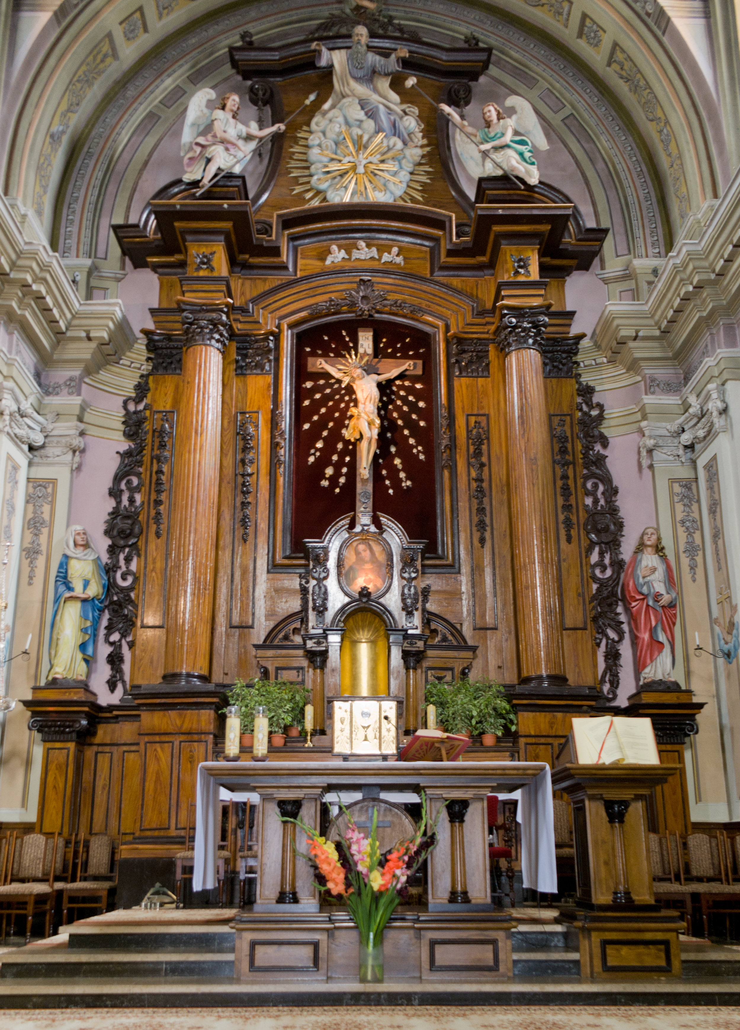 Ołtarz w prezbiterium kościoła oo. Kapucynów w Krośnie